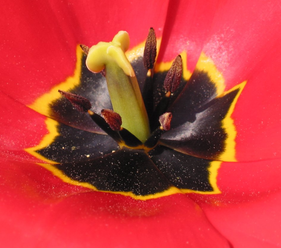 zelfgemaakte foto van tulp met behaarde en gelobde stempel